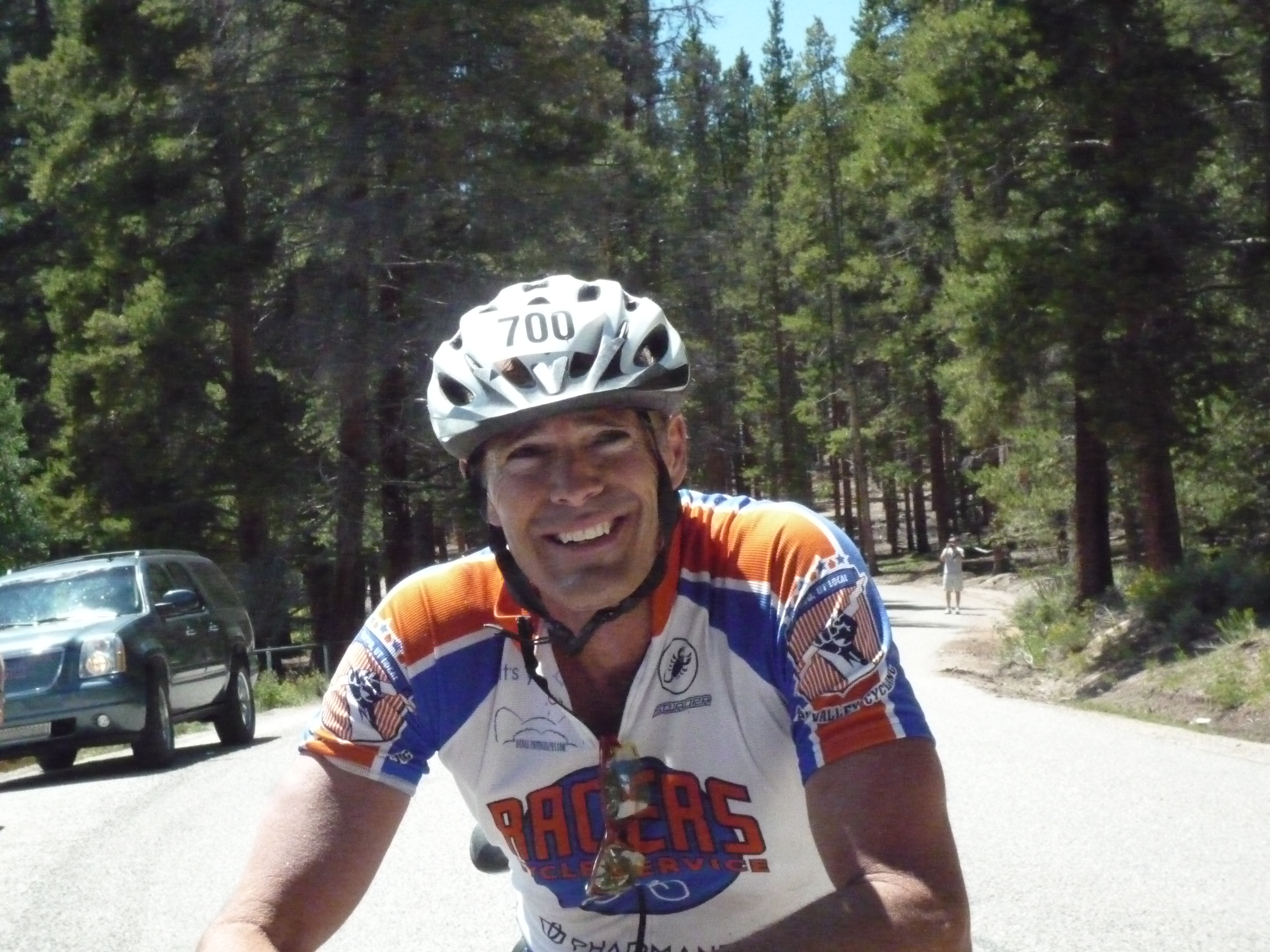 Lee Johnson on bike